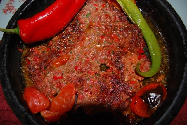 Kıyma etle yapılmış "Belen Tava"